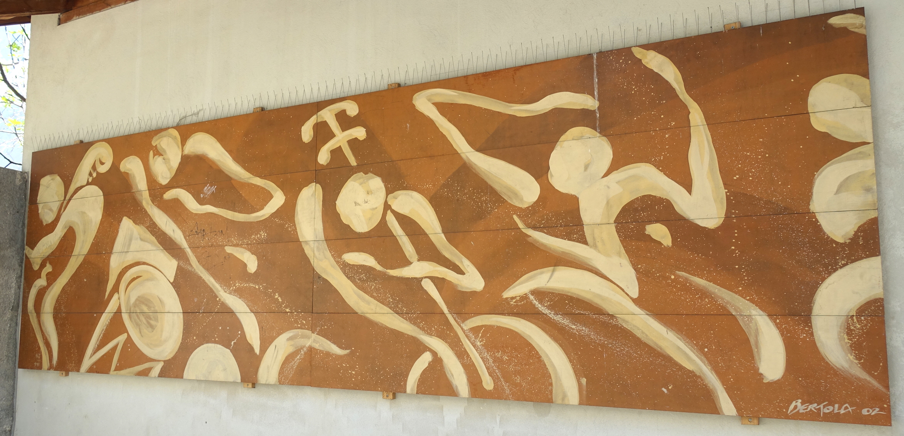 Bâtiments et cours situés entre la rue de Montbrillant et la rue des Gares, îlot nommé « Îlot 13 », derrière la gare Cornavin à Genève. Rue de Montbrillant 10. Oeuvre signée « Bertola 02 » dans la cour intérieure.